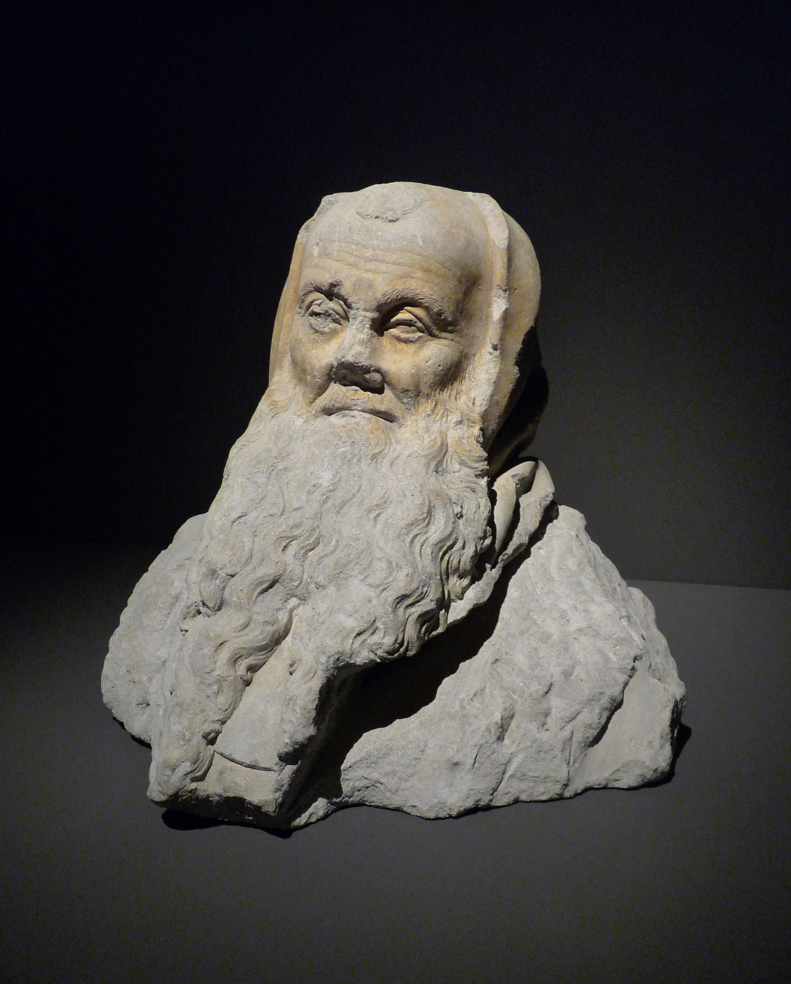 Atelier de Claus Sluter, Fragment d'un buste de saint Antoine, calcaire, début du XVe siècle. Musée archéologique de Dijon